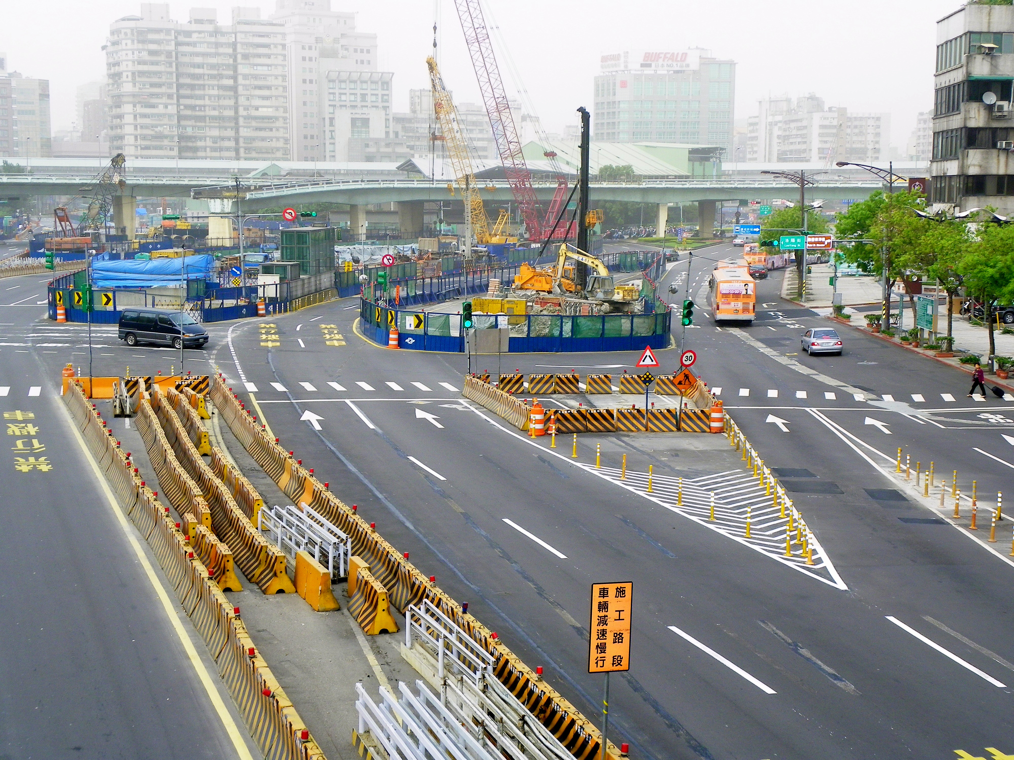 臺北市萬華區中華路一段北門高架道路附近的臺北捷運松山線工地。